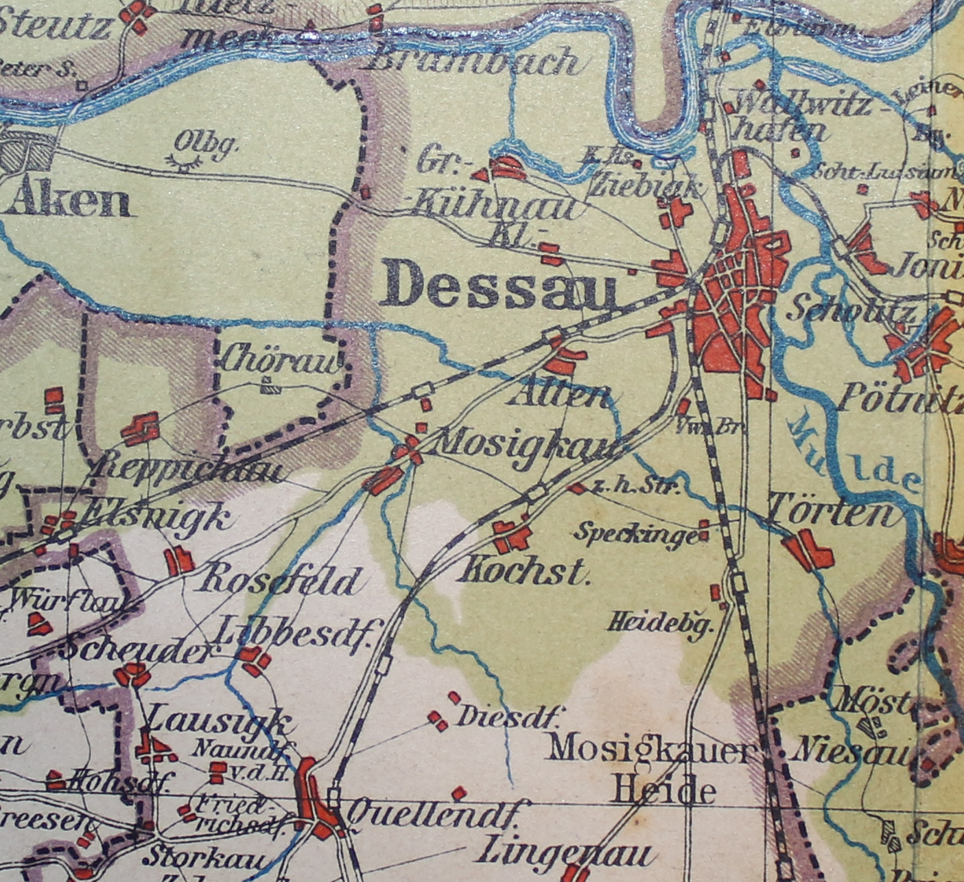 Dessau Kochstedt Anhalt Karte von 1896 Detailansicht